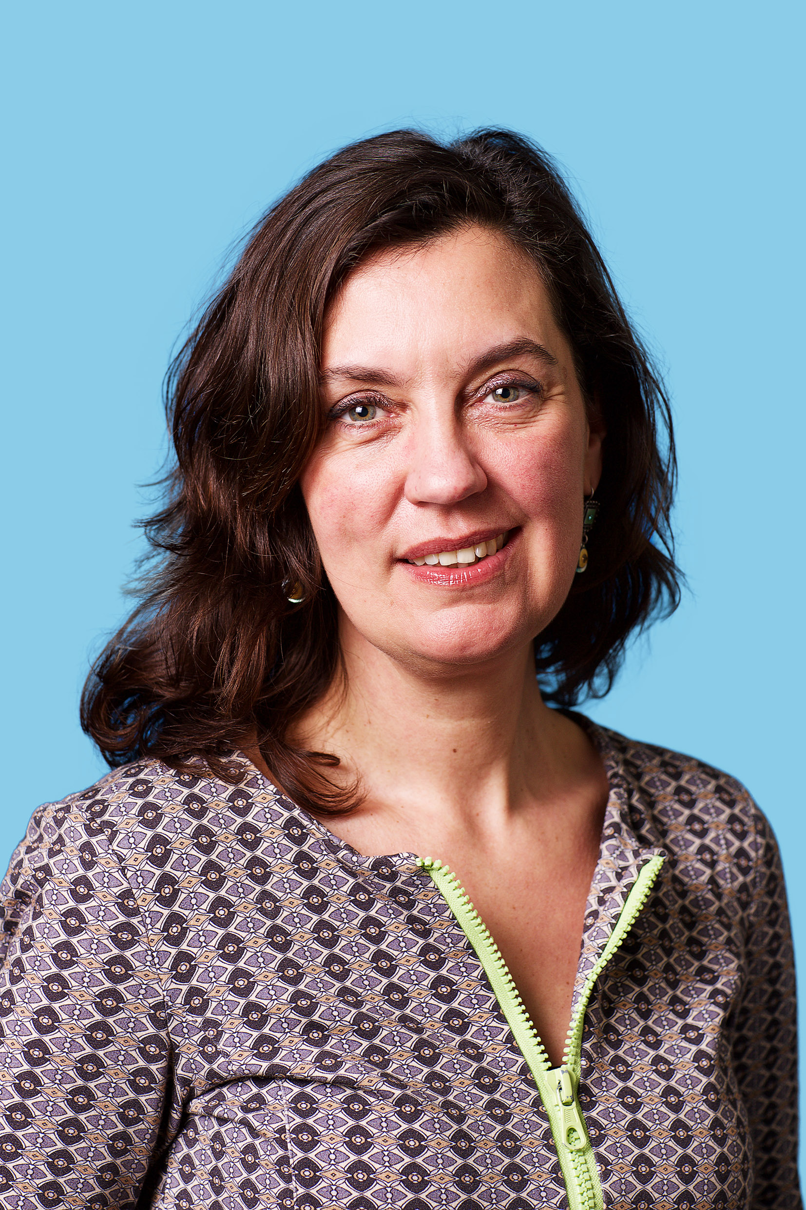 13 februari 2016. Tweede Kamerlid voor de Partij van de Arbeid. Foto: Lex Draijer.